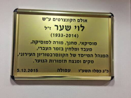 שלט הנצחה ללוי שער בקונסרבטוריון העירוני בעפולה